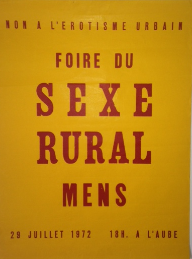 Affiche "canular" éditée par P.P. Kaltenbach aux lendemains de la révolution joyeuse et libertaire de "1968". Placardée dans tout le département de l'Isère et de la Drôme en 1972